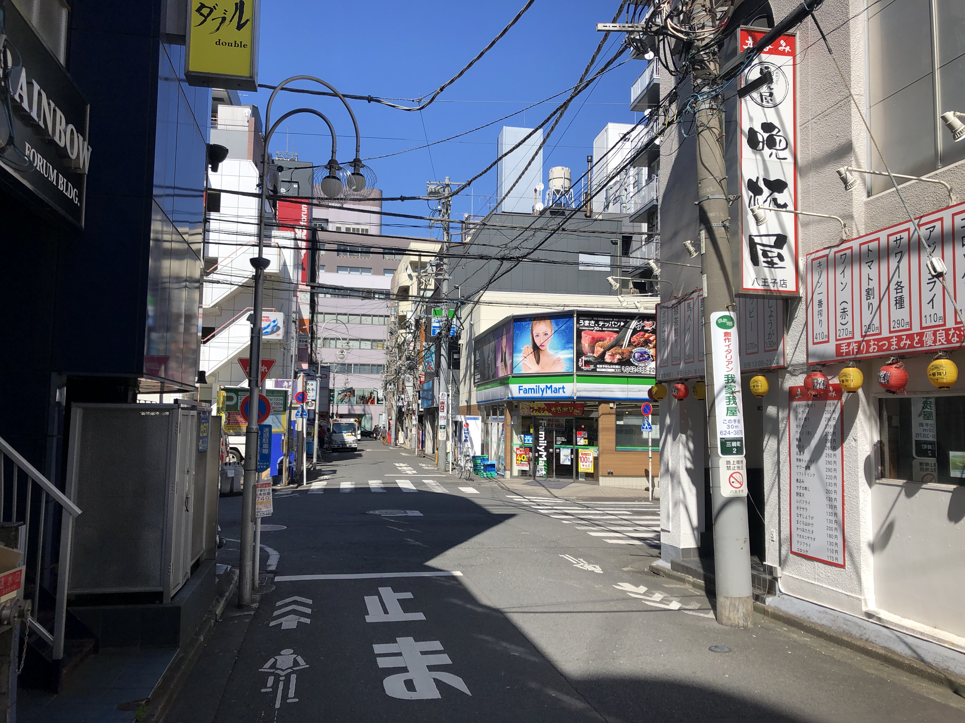 八王子市三崎町みさき通り